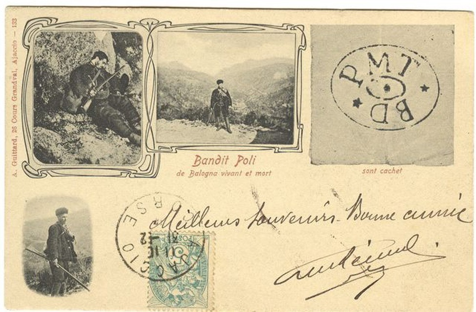 Poli, bandit corse qui sévit au cours des années 1900